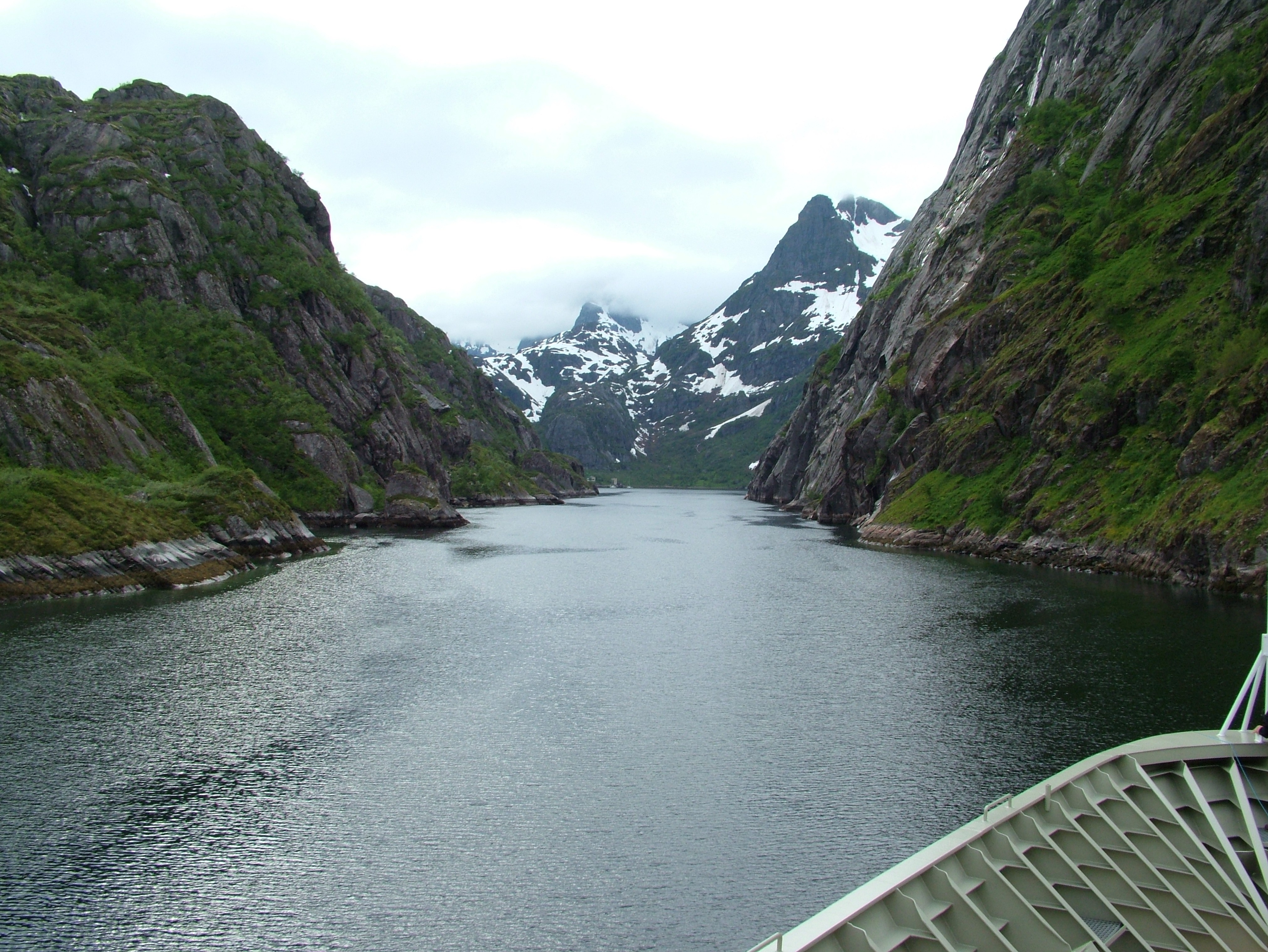 Der Trollfjord (Lofoten) im Juni 2005. Das Bild habe ich selber auf einer Fahrt mit der MS Mitnatsol (ein Hurtigrutenschiff) fotografiert.